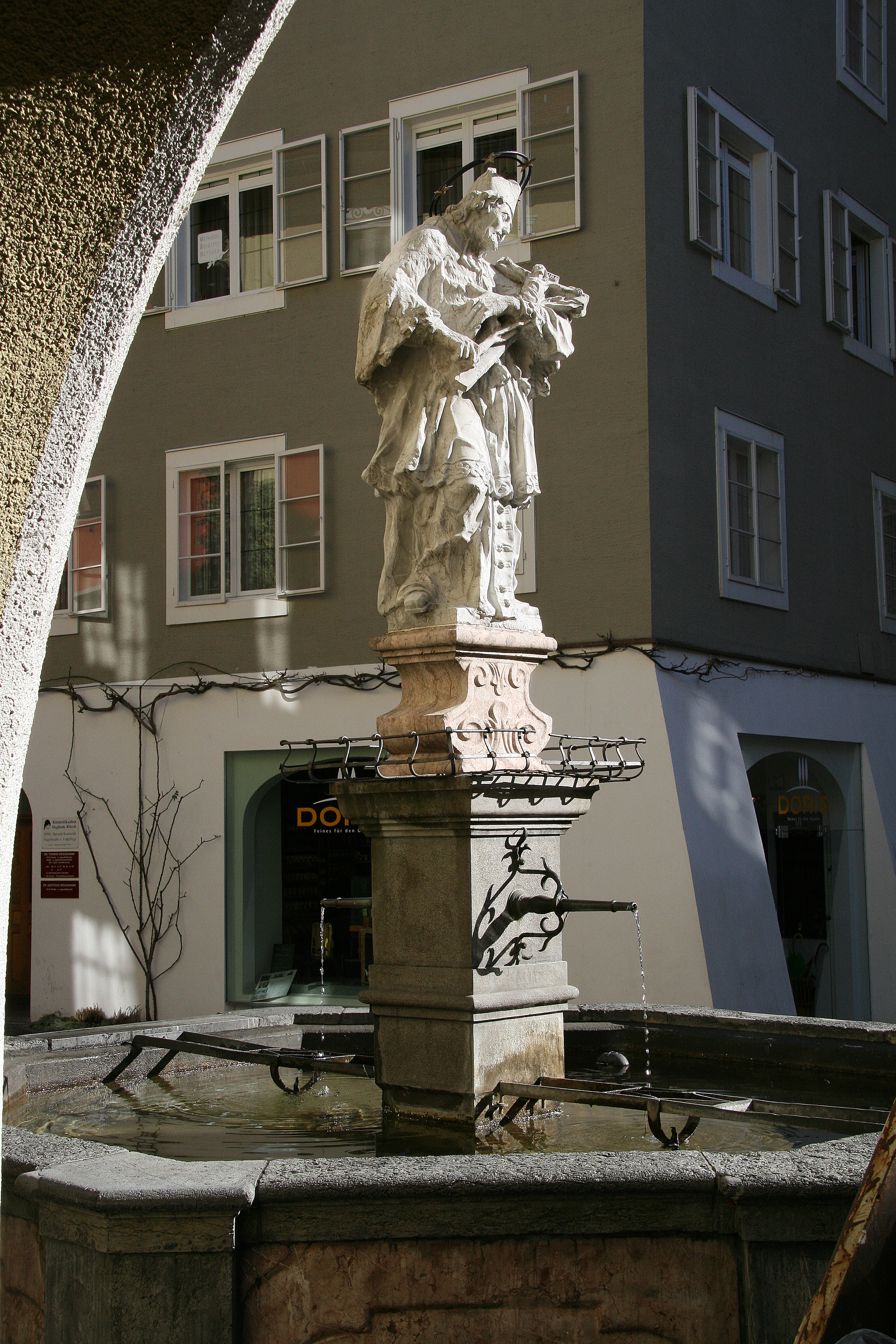 der Nepomukbrunnen erbaut 1730, Rathausgasse in der Altstadt von Bludenz, Vorarlberg